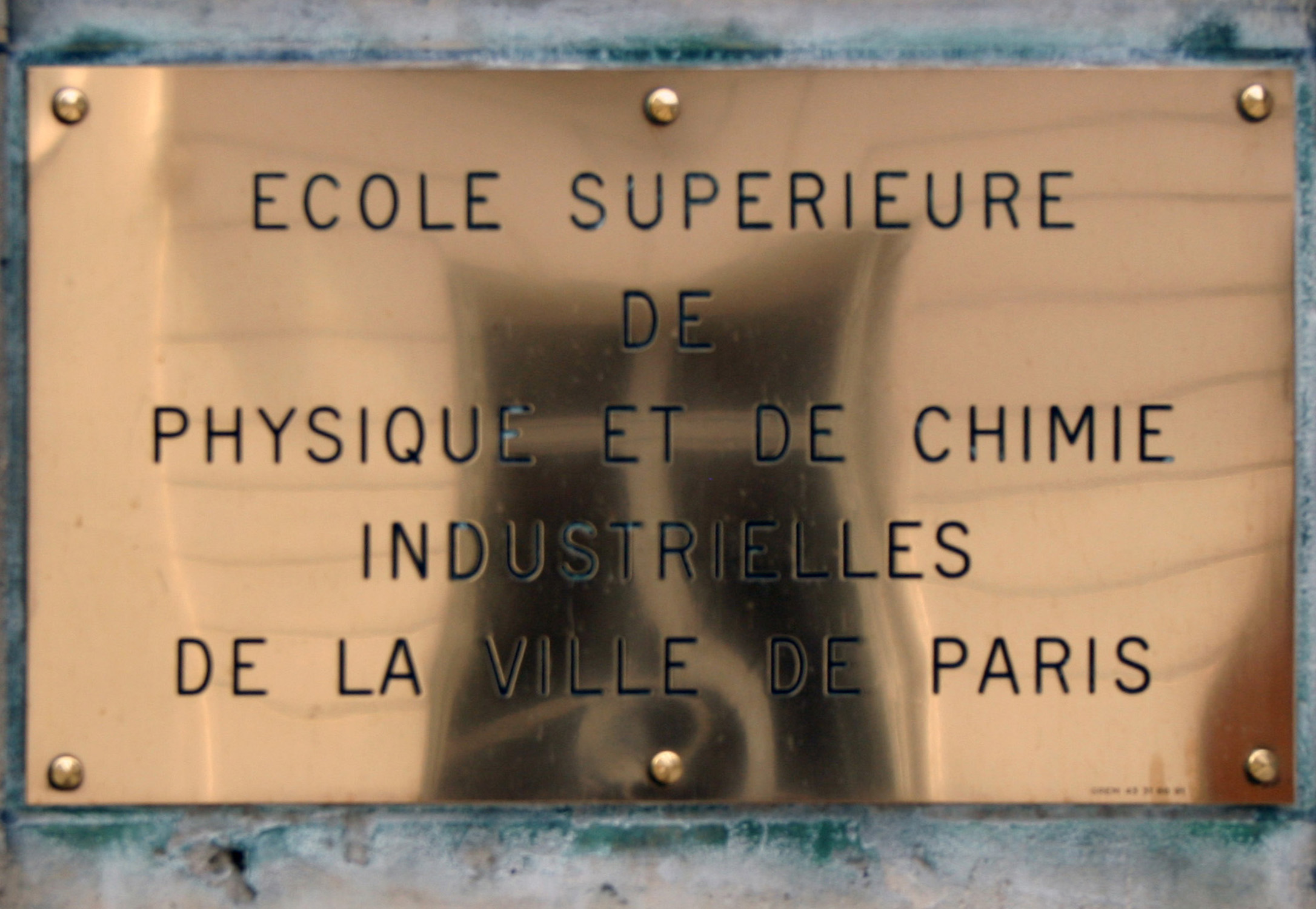 ESPCI ParisTech. Futur en Seine 2011.